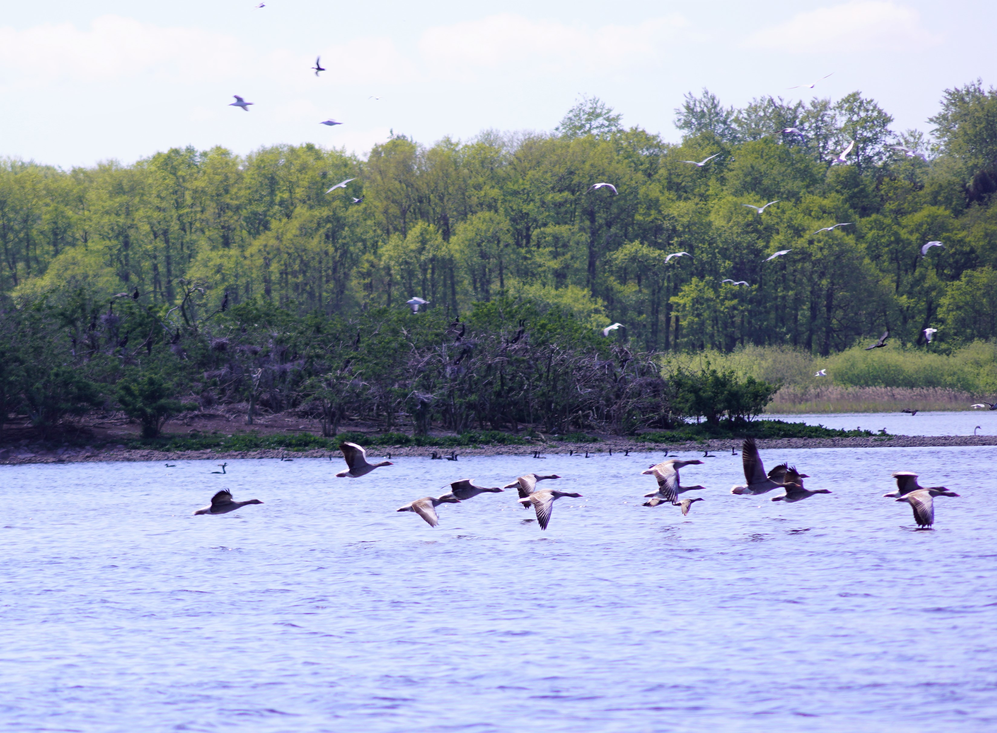 Brændegård Sø på Fyn , fugleøen med skarvkolonien